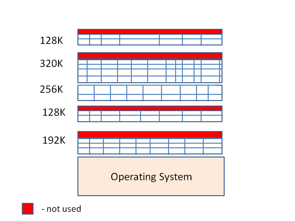 תיאור סכמטי של הזיכרון האמיתי במערכת ההפעלה MVT. Structure of MVT Mainframe Oeprating System Memory